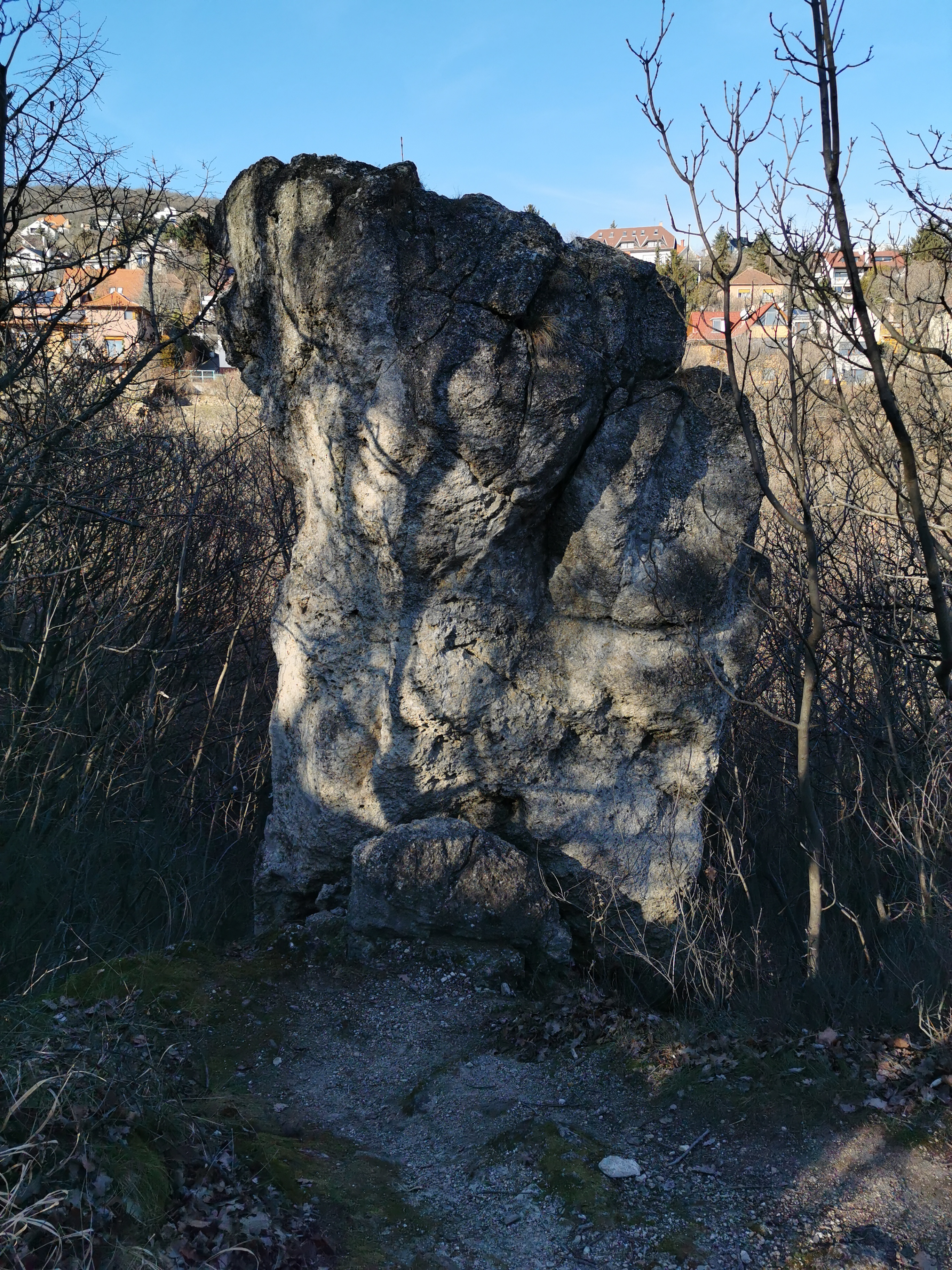 Ördög-szószék, 2020. február 1-én, szombaton. Az Ördög-ormon, Budapesten.